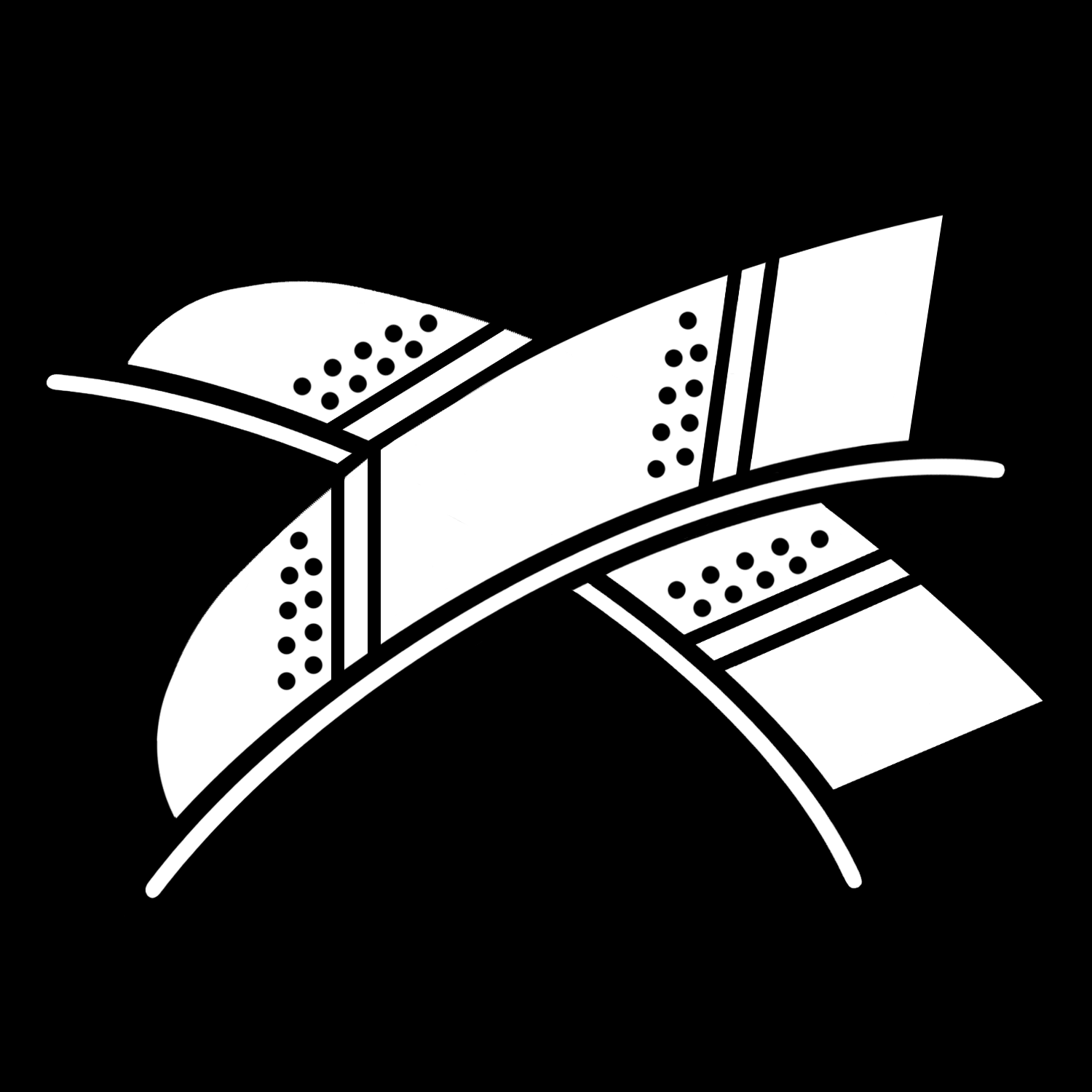 「片桐違い鷹の羽」紋（染抜）